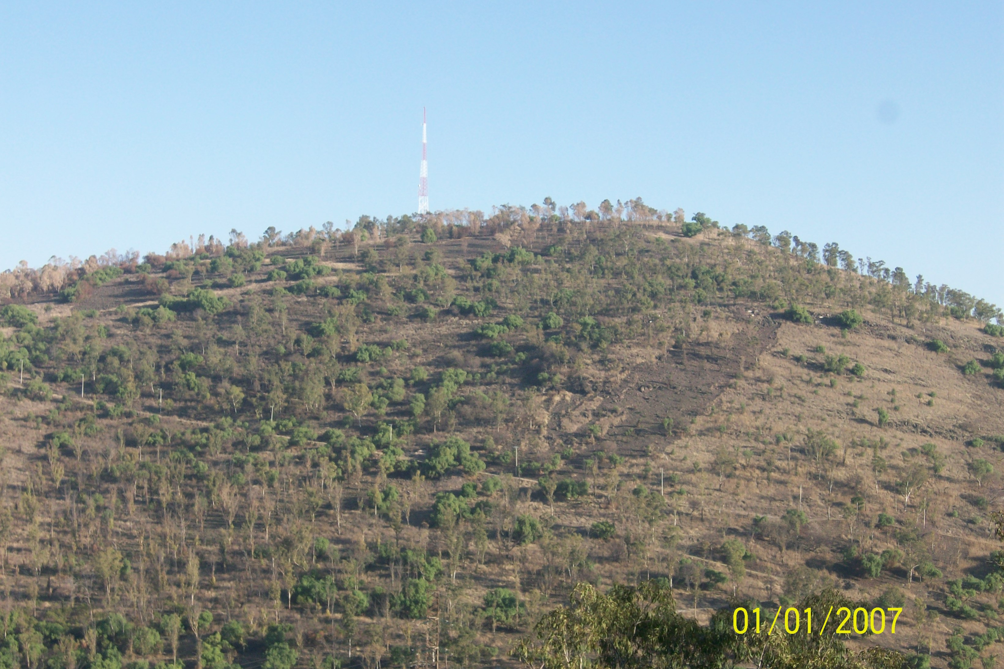 Del D.F. y Edo de Mèxico.